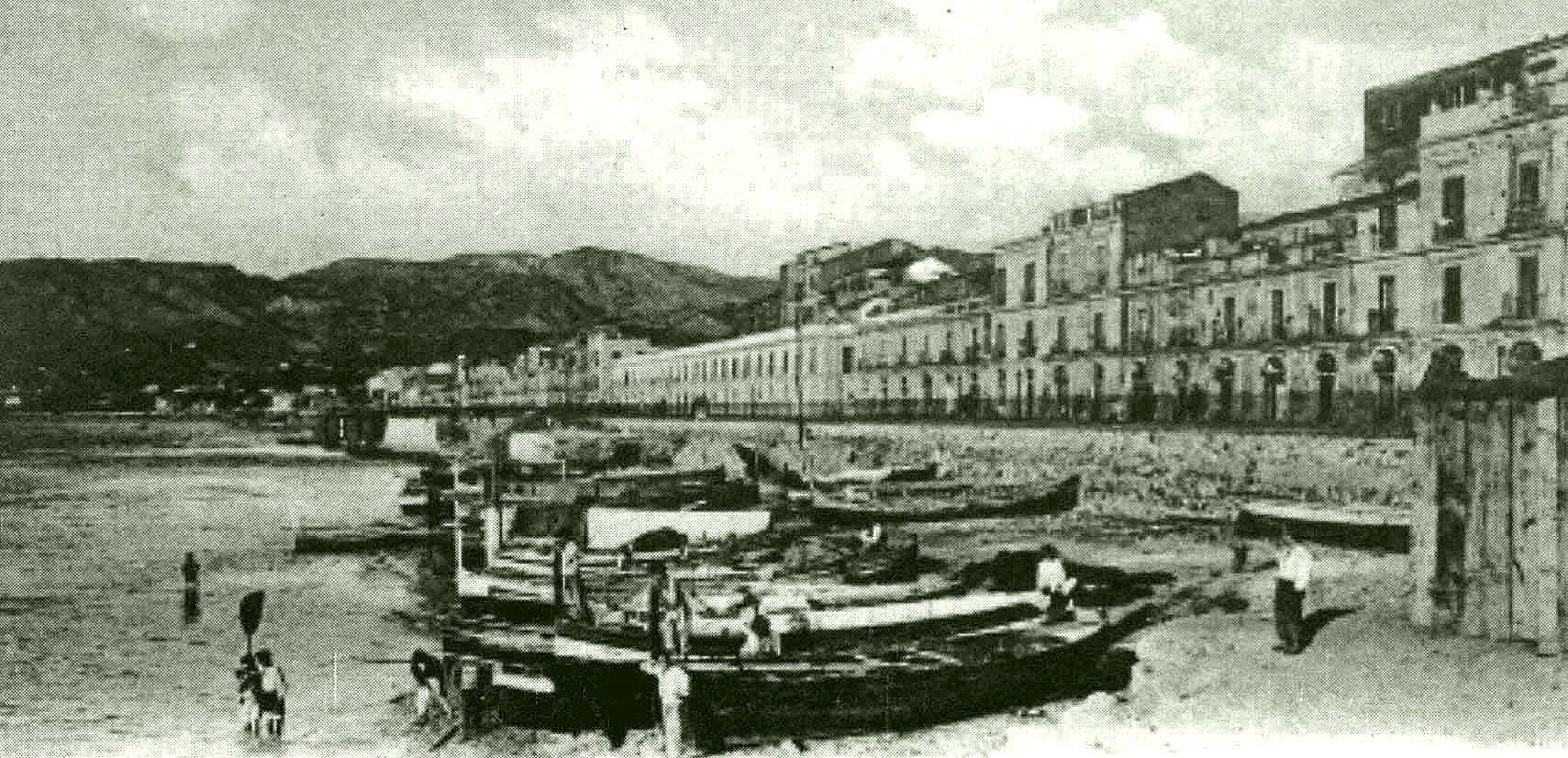 old postcard of Reggio Calabria